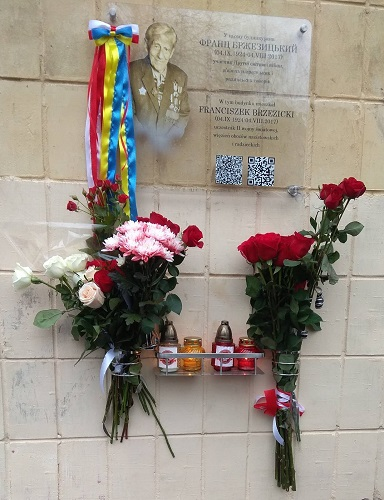 Таблиця пам`яті Франца Бржезицького. Ініціатором встановлення таблиці є ГО "Студентський польський клуб" у Житомирі за підтримки Фонду "Допомога полякам на сході"